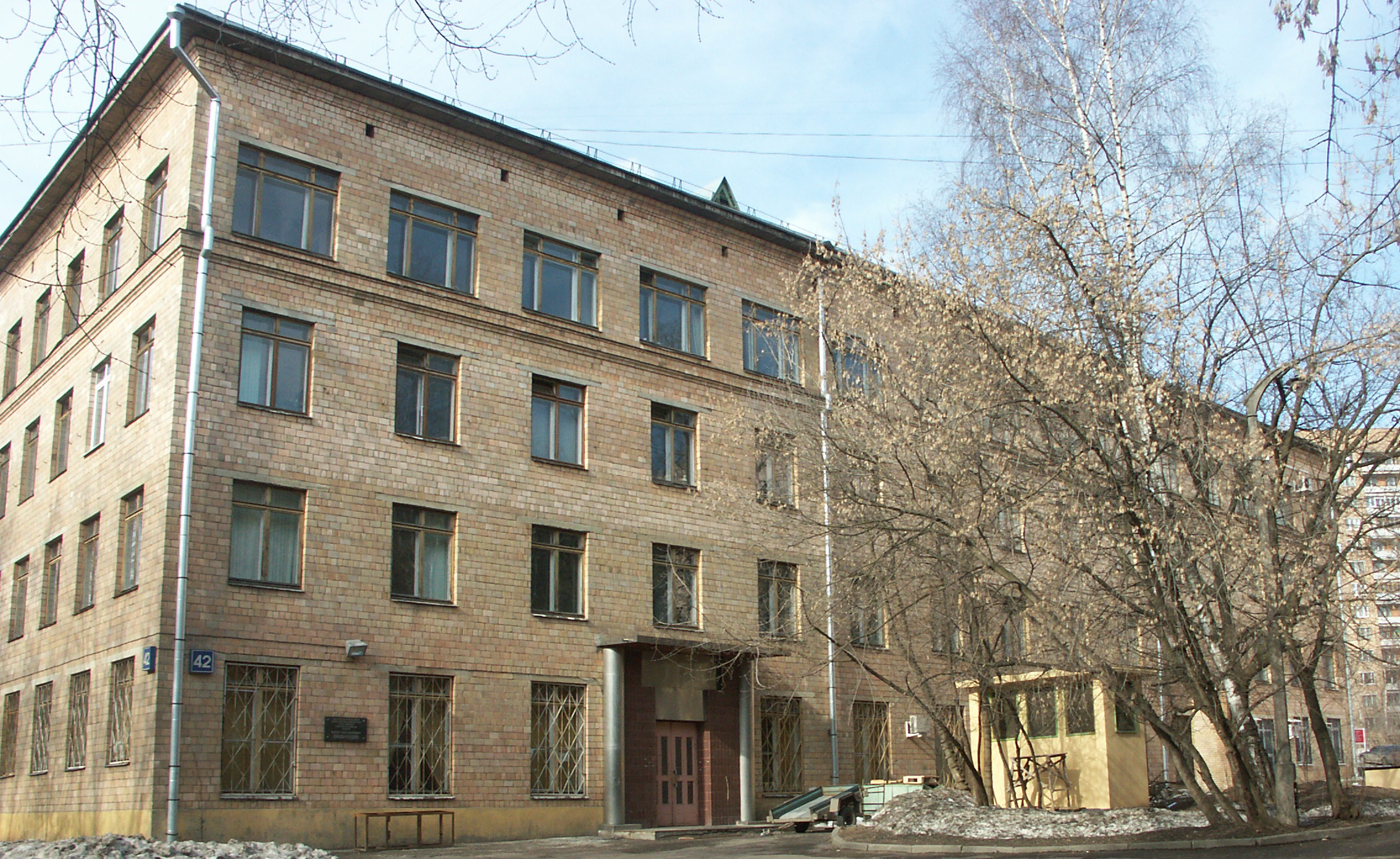 Старое здание МИАН Author: User:Glaue2dk